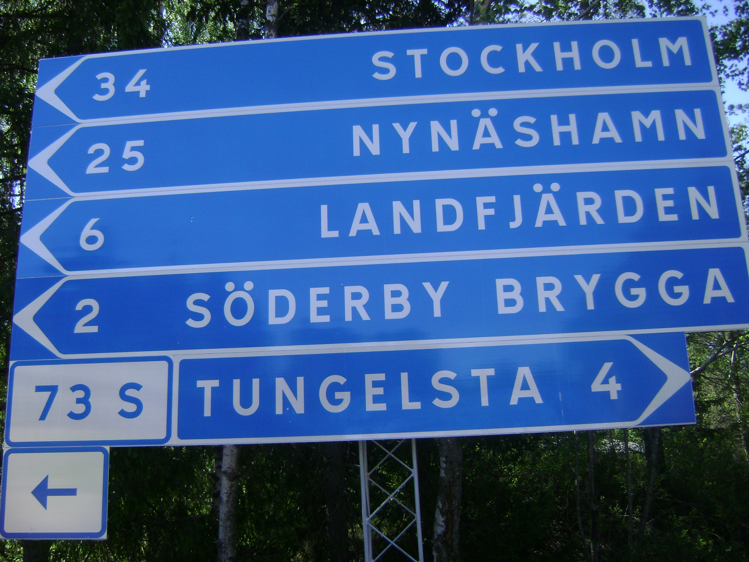 Vägskylt vid korsning strax norr om Gryt, Västerhaninge, Haninge kommun.